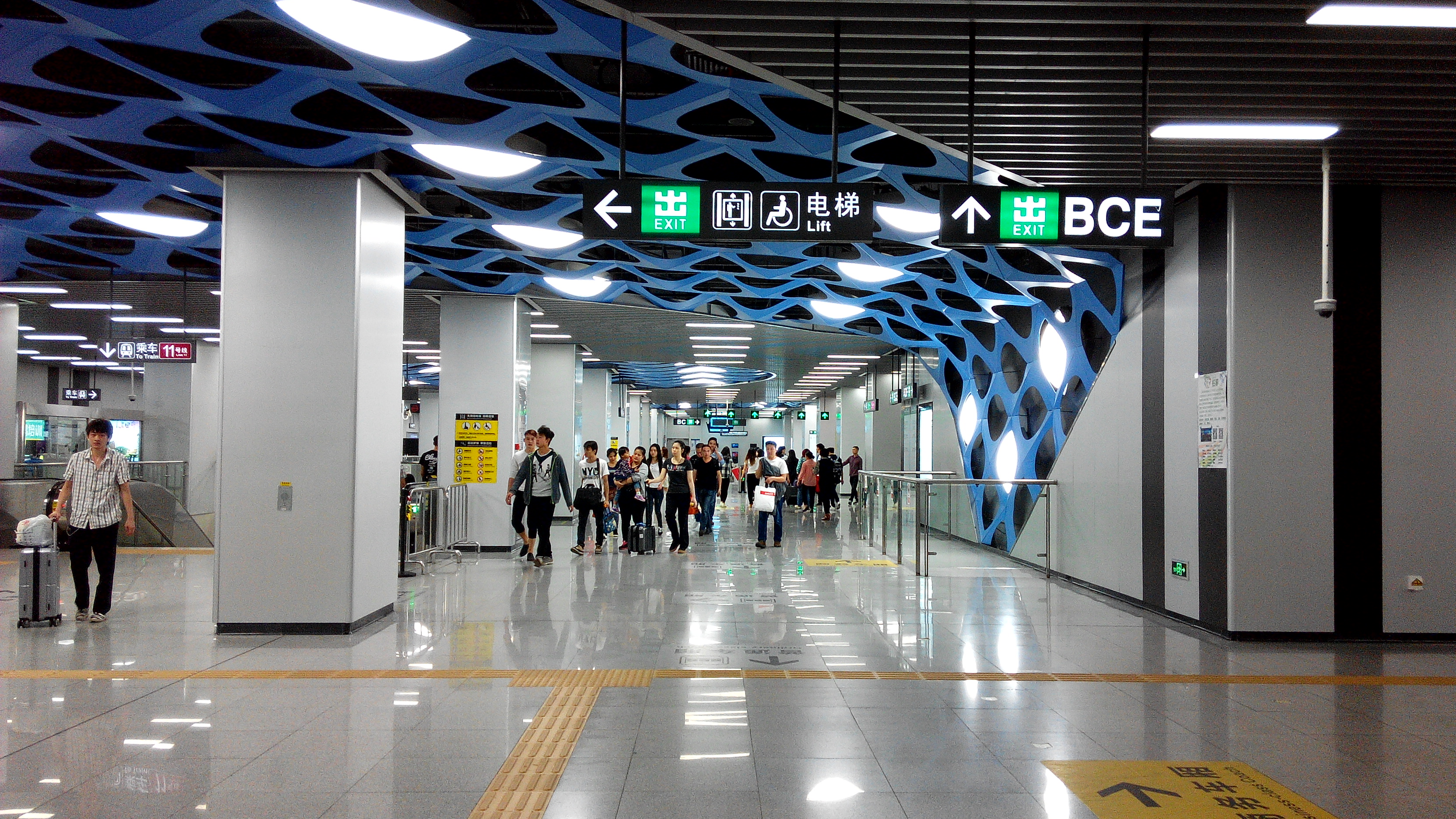 深圳地铁11号线 前海湾站站厅